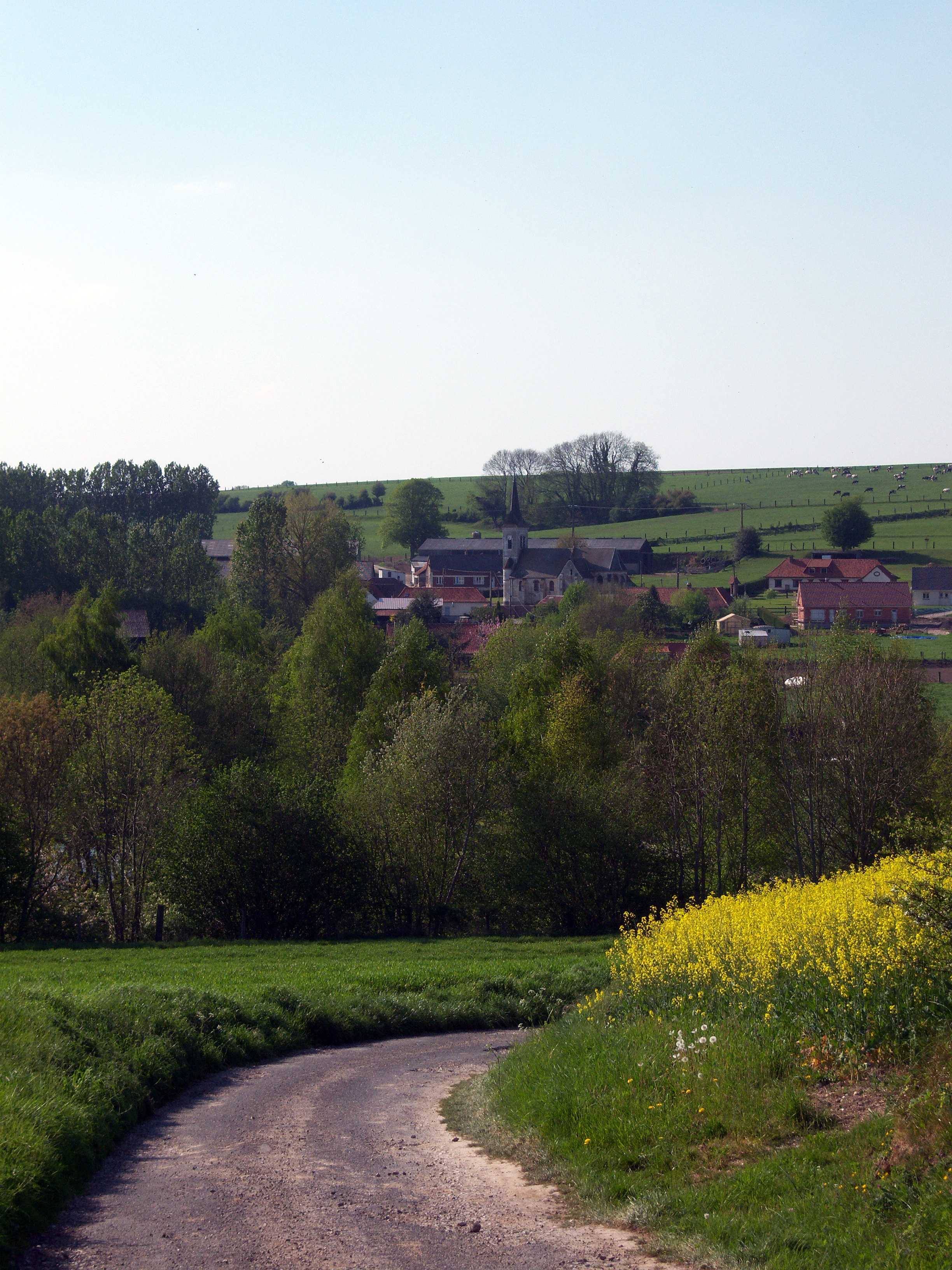 Vue du village.